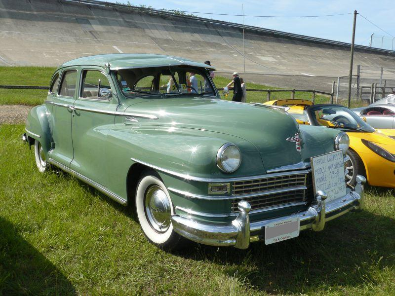 Montlhery 2012